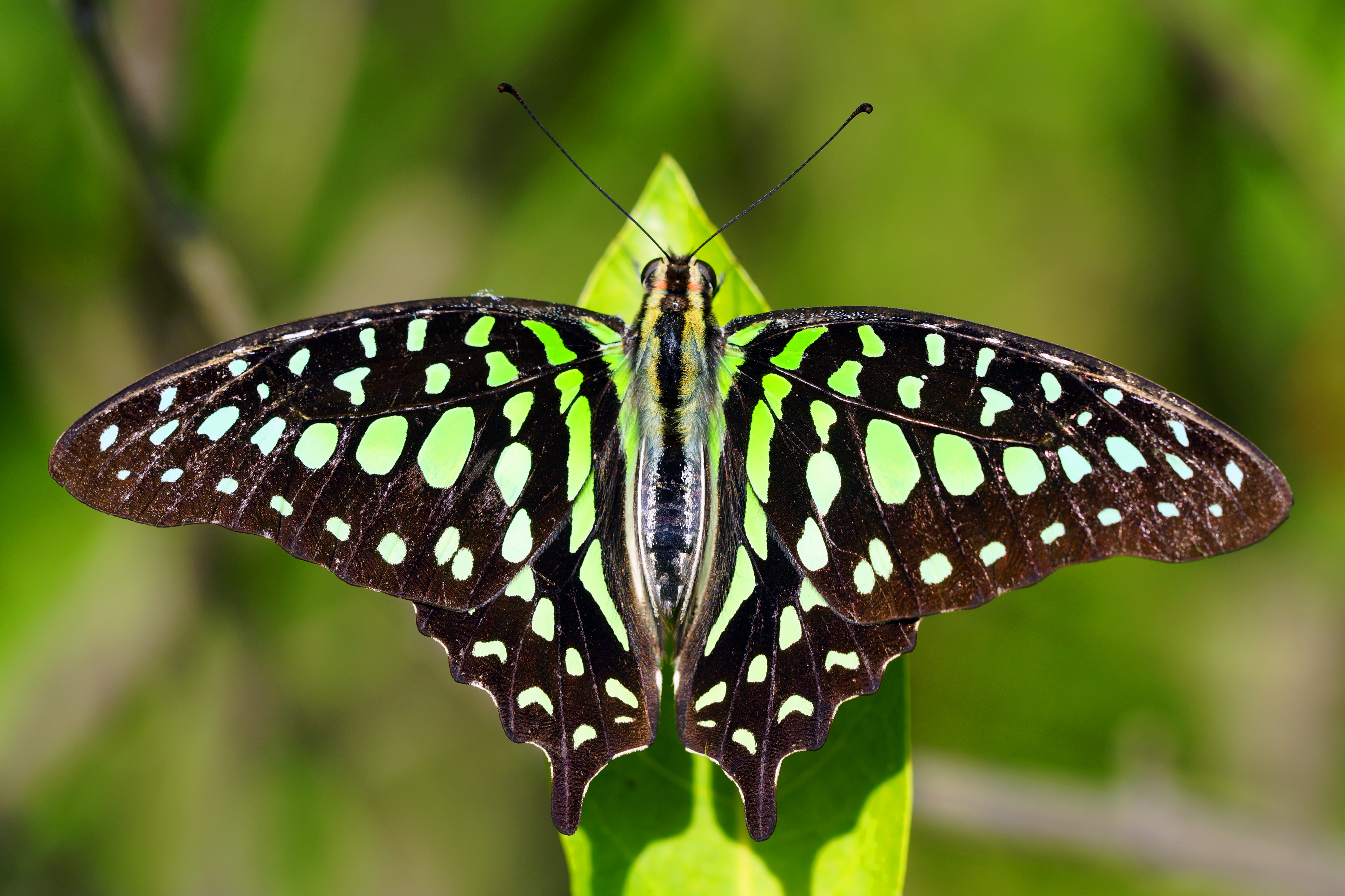 翠班青鳳蝶（Graphium agamemnon）